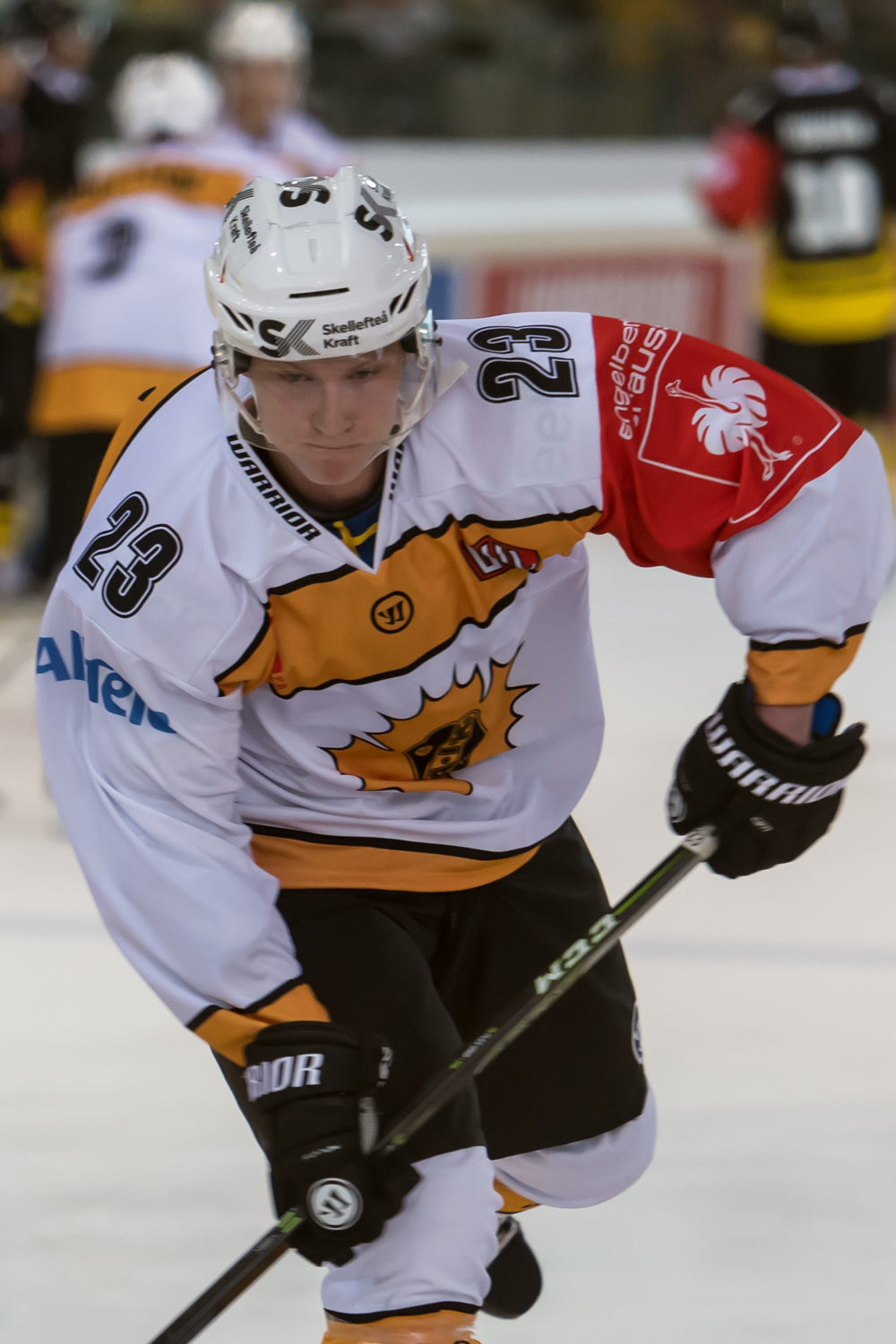 Champions Hockey League - Vienna Capitals vs Skelleftea AIK am 18.08.2016. Bild zeigt Simon Krekula (Skelletea AIK).